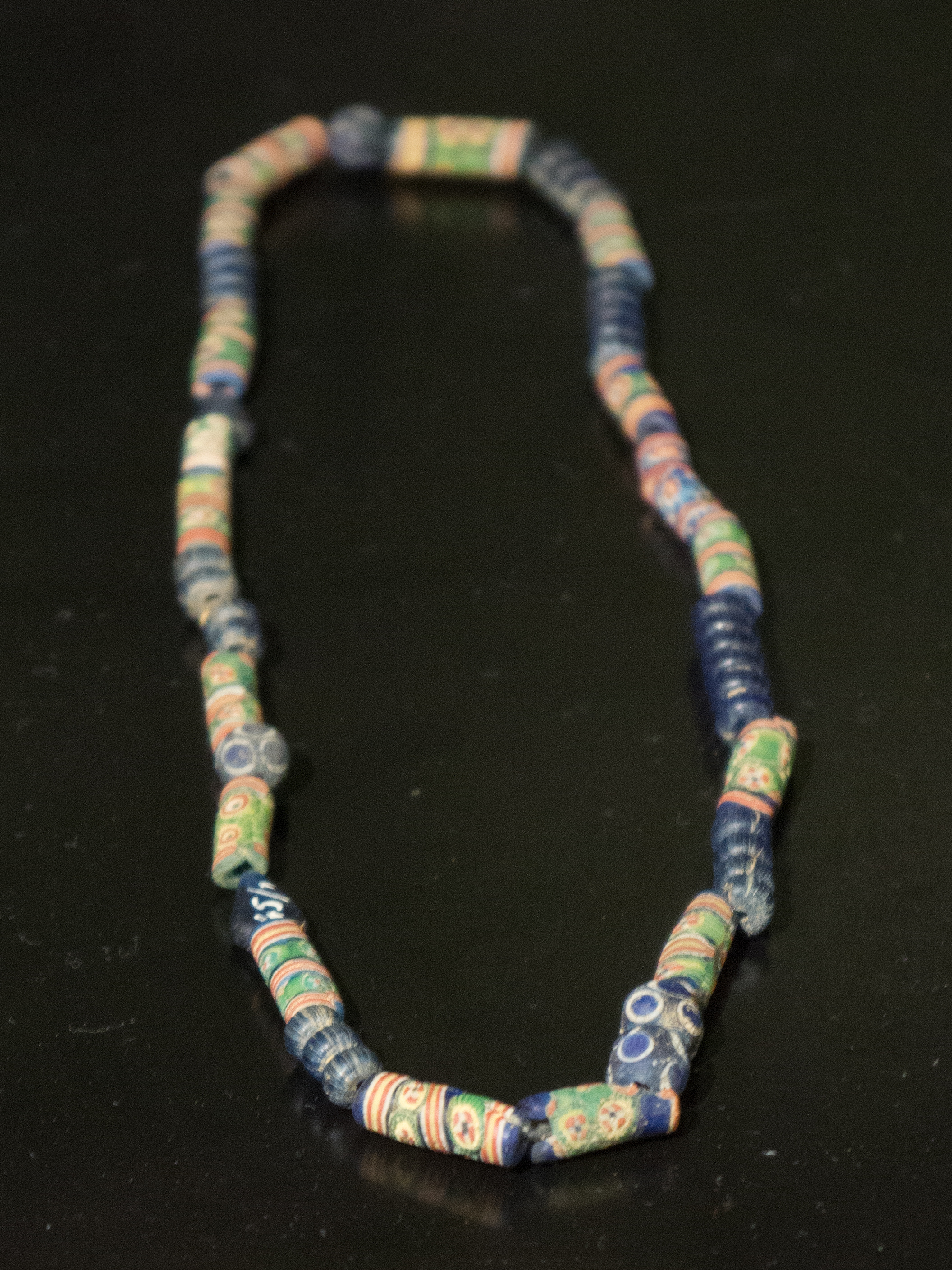 Collier en verre, 7e à 8e siècle, Shurdhah. Musée archéologique de Tirana.